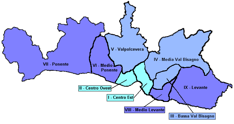 Municipi di Genova